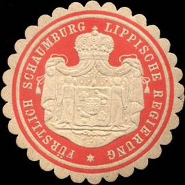 Sealing stamp Title: Fürstliche Schaumburg - Lippische Regierung Description: geprägt, rot, weiß Place: Bückeburg size: 4 cm